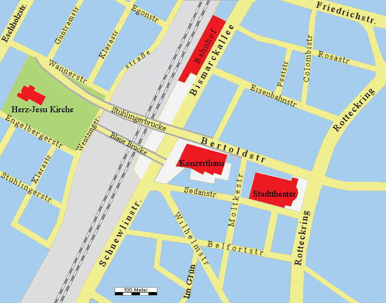 map of Freiburg im Breisgau - vicinity of Konzerthaus Freiburg